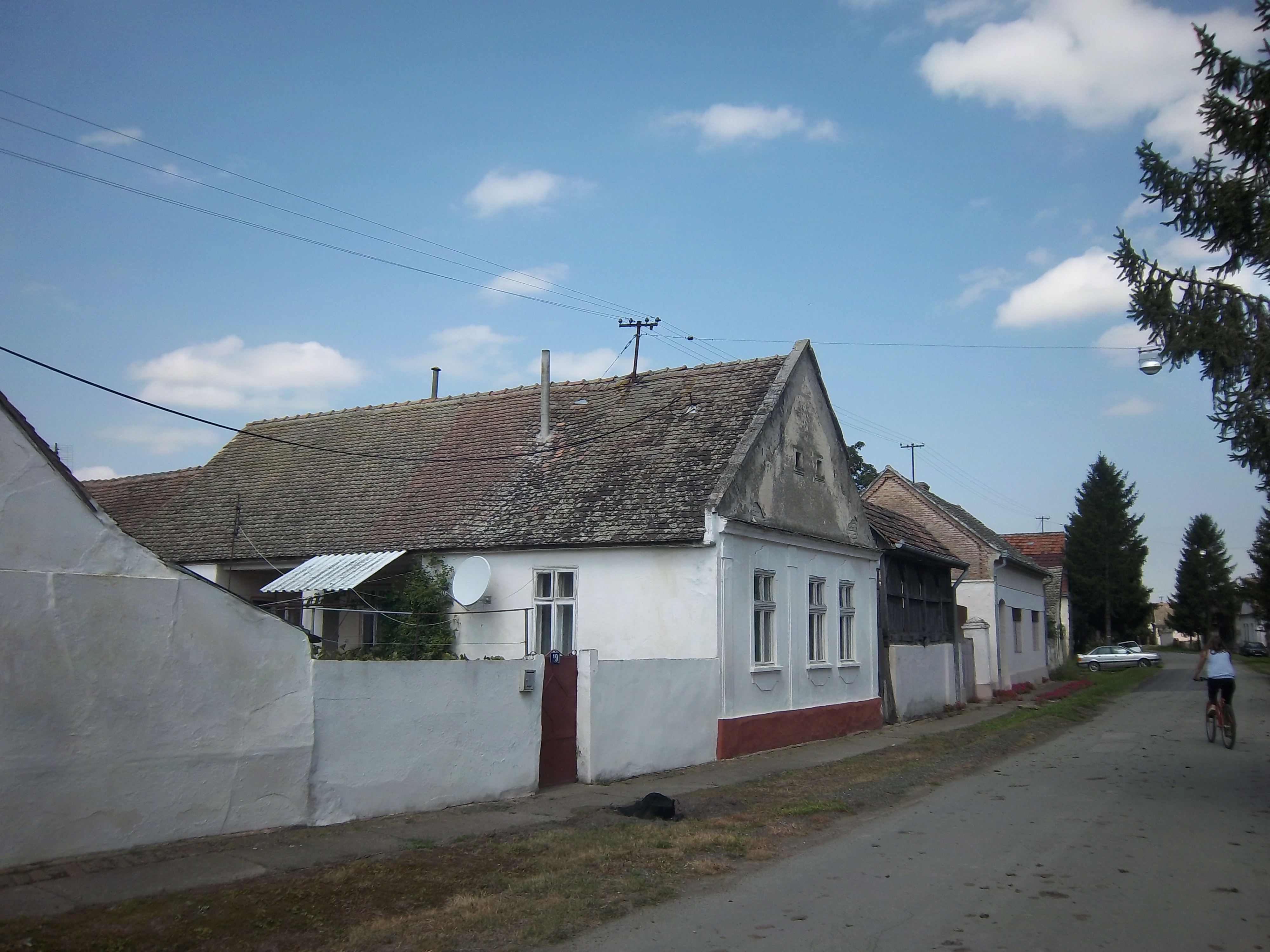 Srpskohrvatski / српскохрватски: Vinkovački Banovci